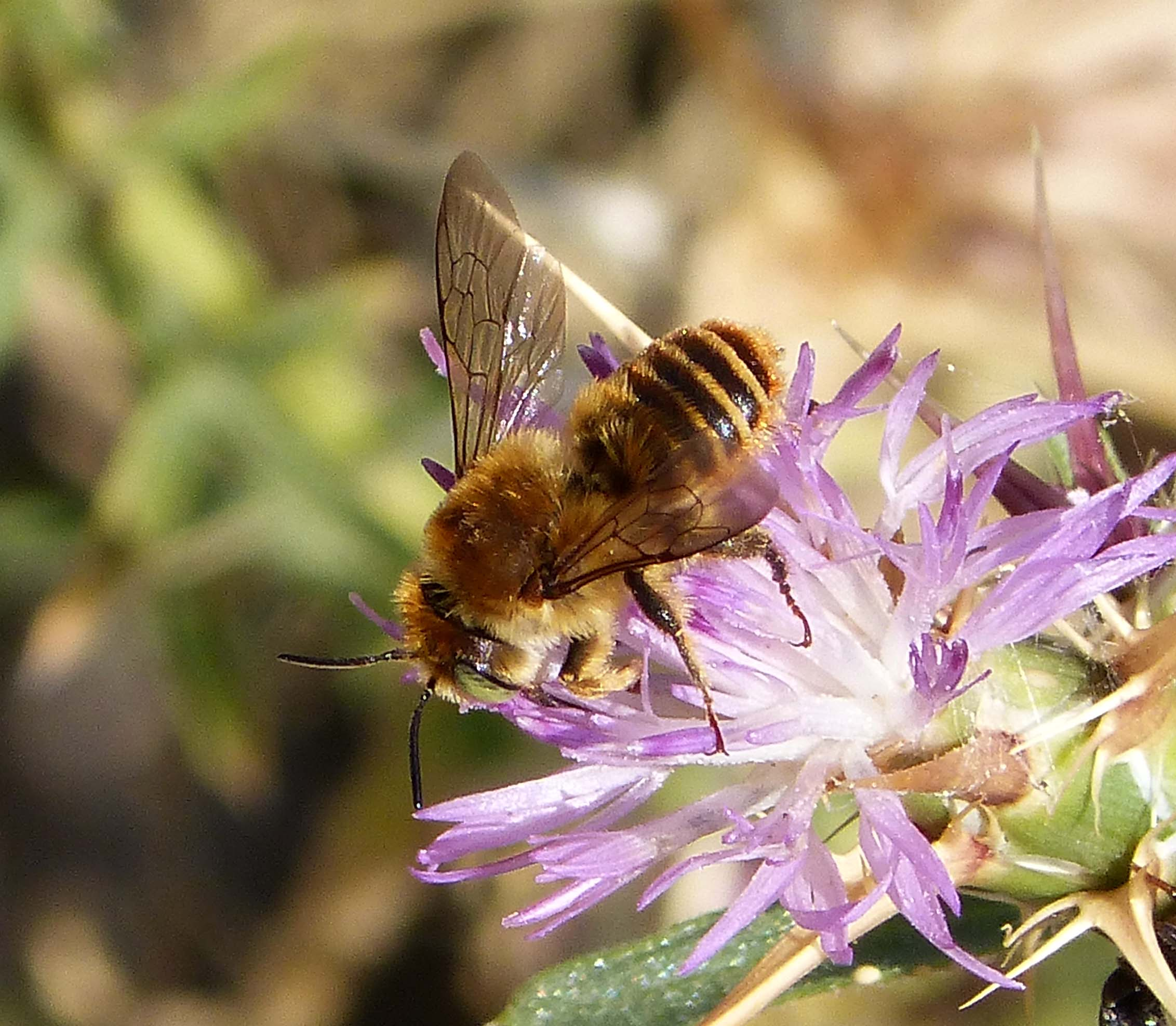 Benaocaz, Cadiz Procince, Andalucia, Spain